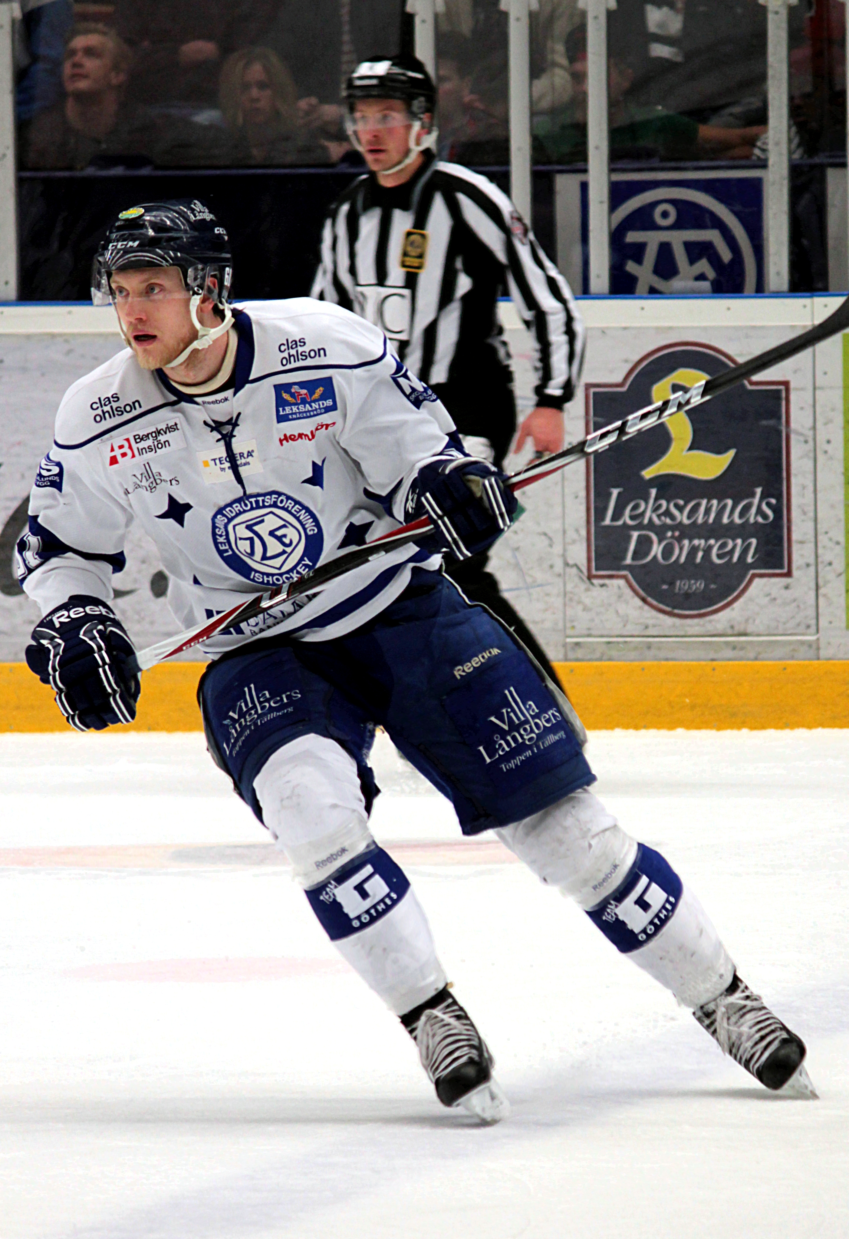 Johan Ryno i kvalmatchen mellan Leksands IF och Djurgårdens IF i Leksand 2012-03-31.